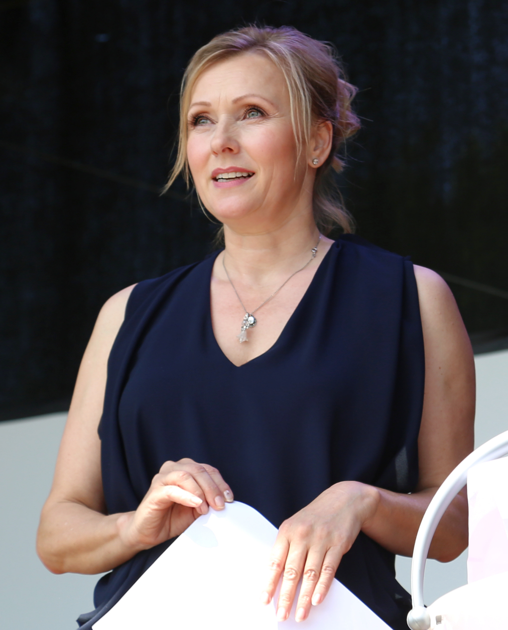 Dana Golombek, Malin Steffen und Patricia Schäfer ziehen Losnummern beim "Rote Rosen"-Fantag 2017, am 18.06.2017 in Lüneburg.